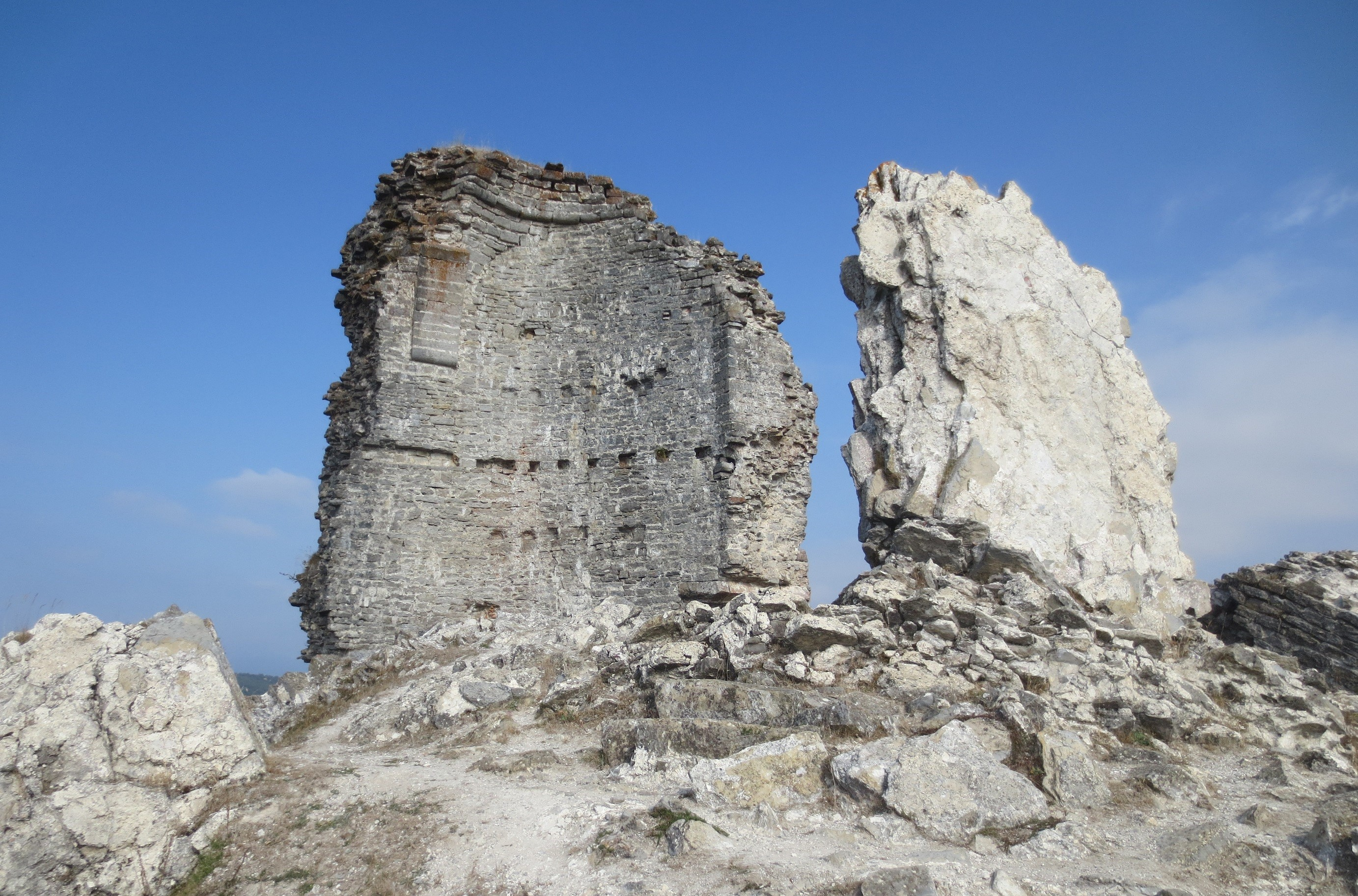 Gebara gaztelua